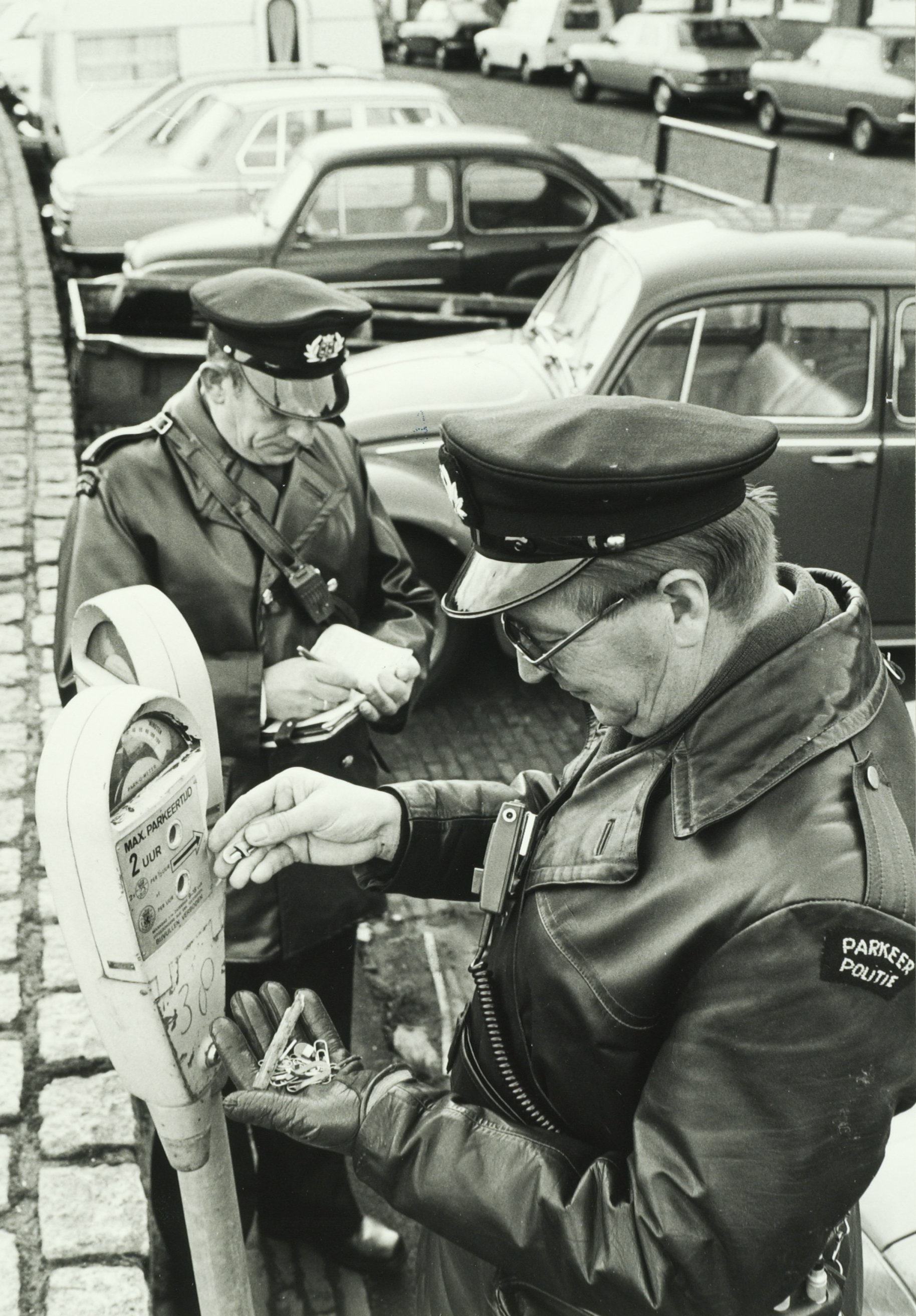 CollectieCollectie Fotoburo de BoerInventarisnummerNL-HlmNHA_5400464153 BeschrijvingParkeerpolitie.FotonummerNL-HlmNHA_5400464153DocumenttypeHistorieprenten, tekeningen en foto'sVervaardigerBoer, Cees de (1918-1985) LandNederland ProvincieNoord-Holland GemeenteHaarlem PlaatsHaarlem Begindatum1977Einddatum1977TechniekFoto Plaatsinggb33